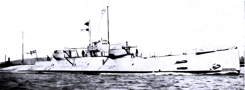 Englantilainen sukellusvene X1